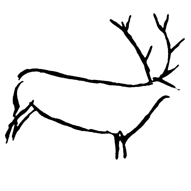 Ciervo pintado en la cueva de Las Chimenesas, del monte Castillo, Puente Viesgo (Cantabria, España)